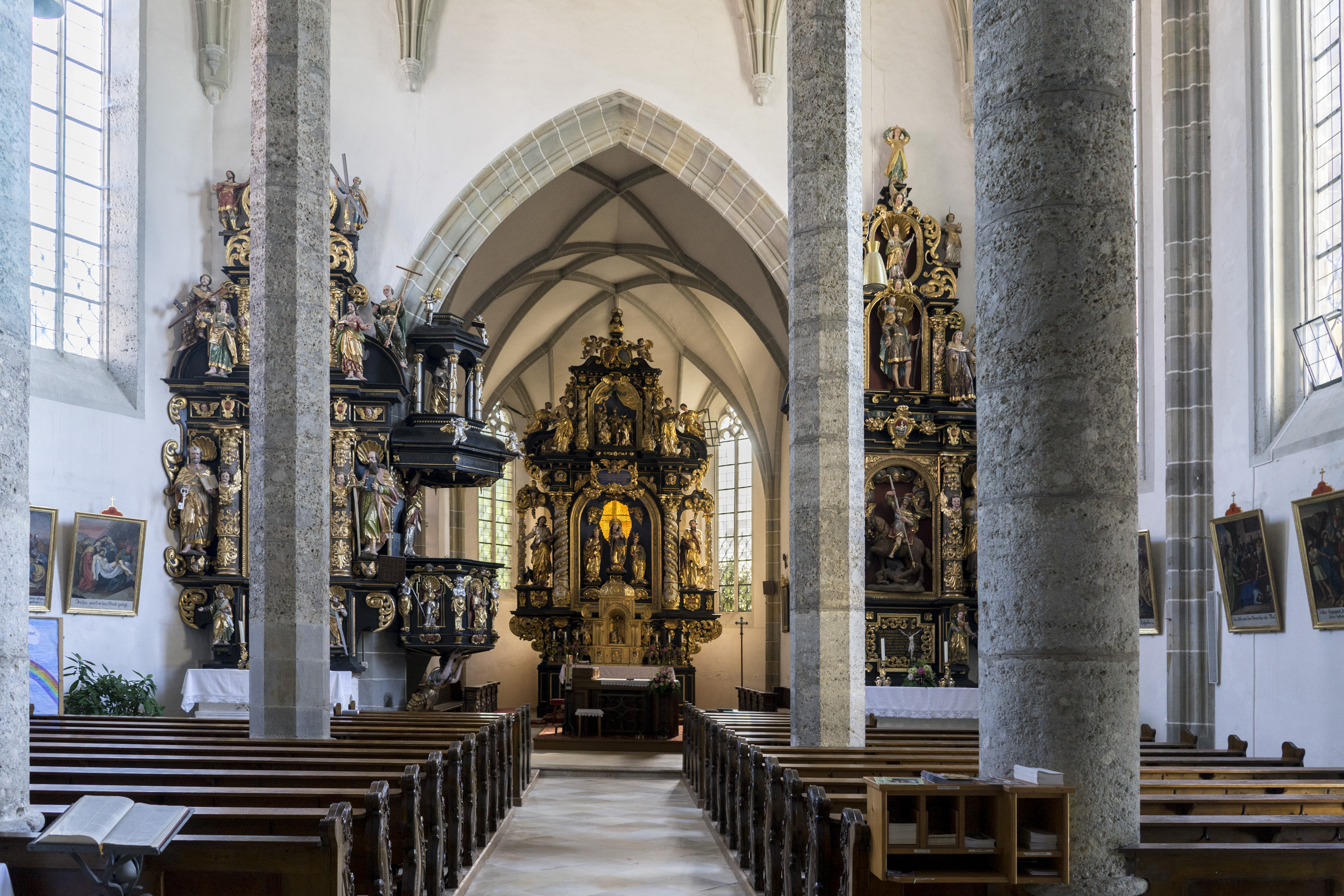 Pfarrkirche Zell am Pettenfirst Innenraum